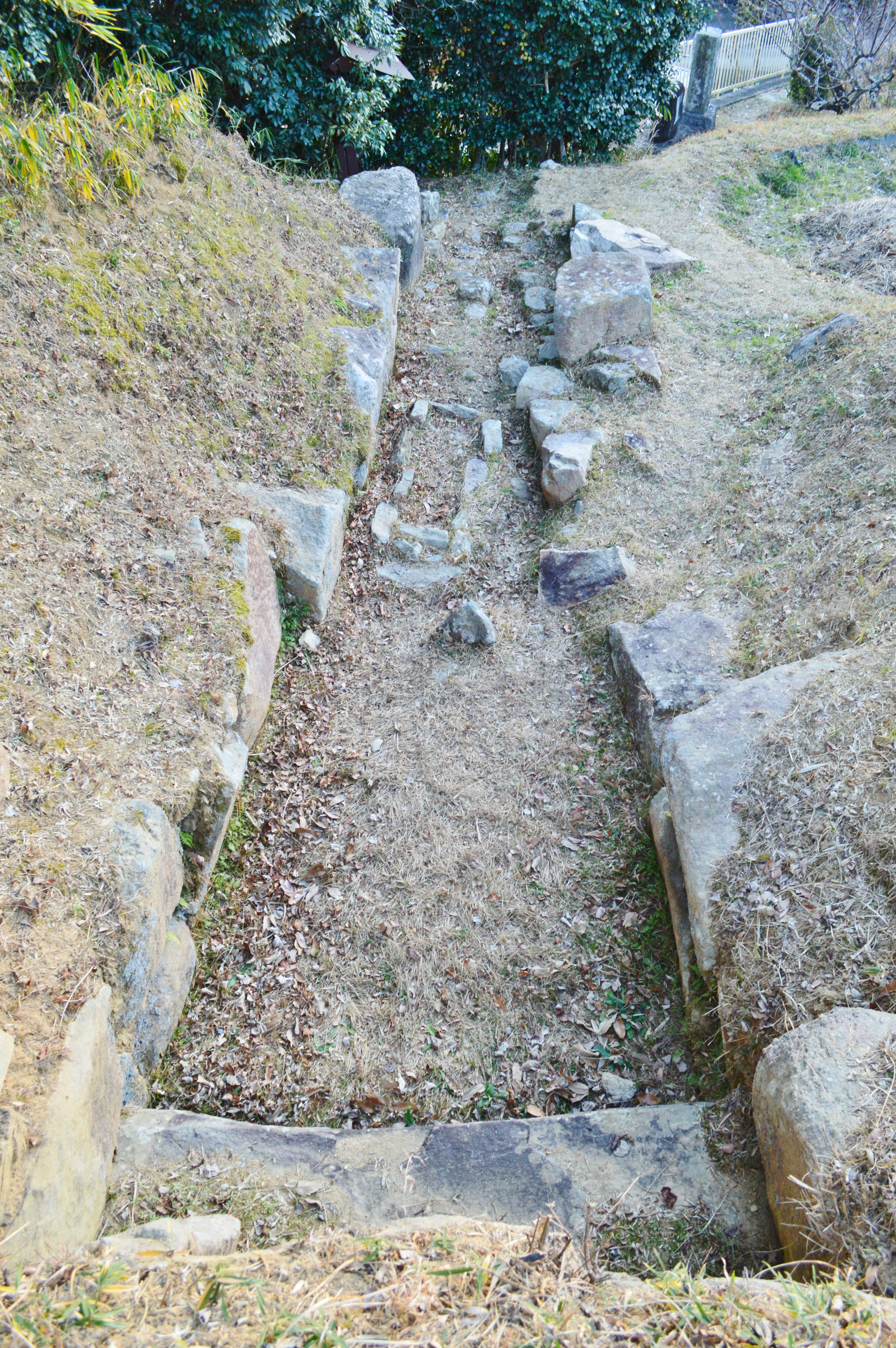 三里古墳 石室 (玄室奥壁から羨道を望む) Nikon D3200